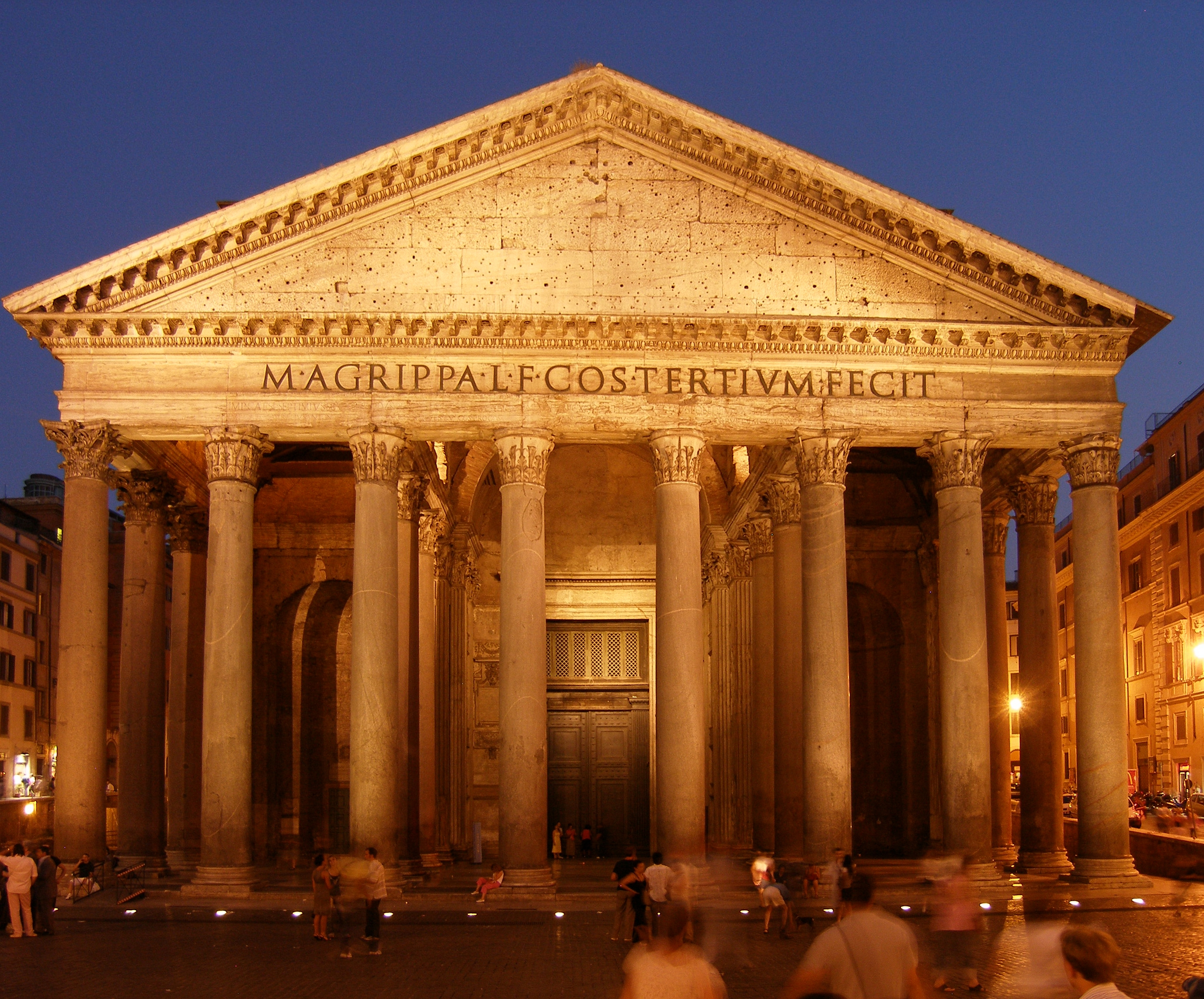 Rom, Pantheon bei Nacht